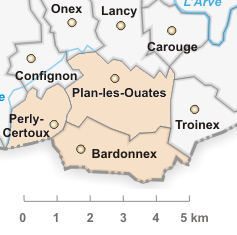 Territoire de l'ancienne commune de Compesières, de 1816 à 1851, canton de Genève.